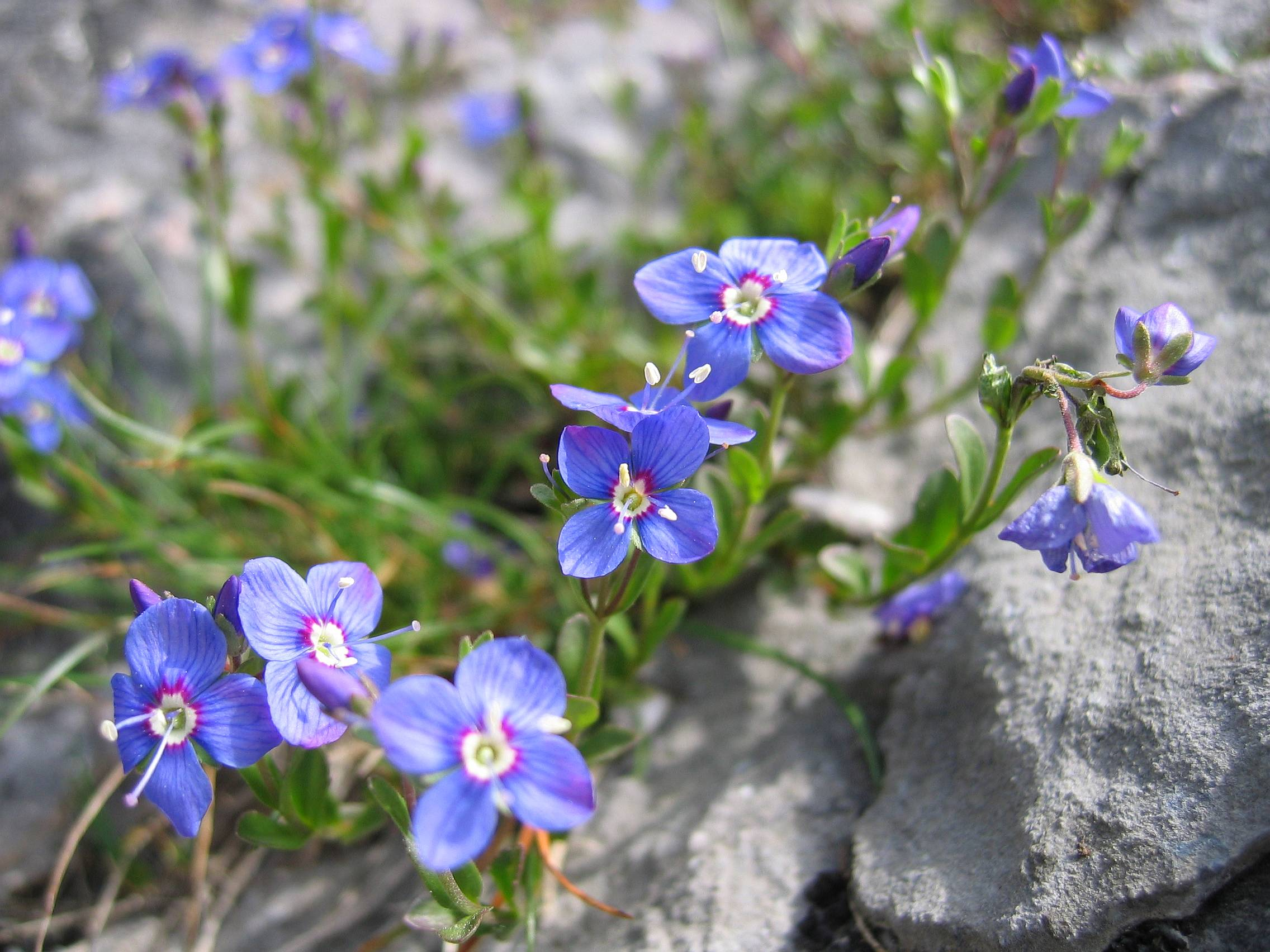 Veronica fructicans, Traunstein, Upper Austria, Austria